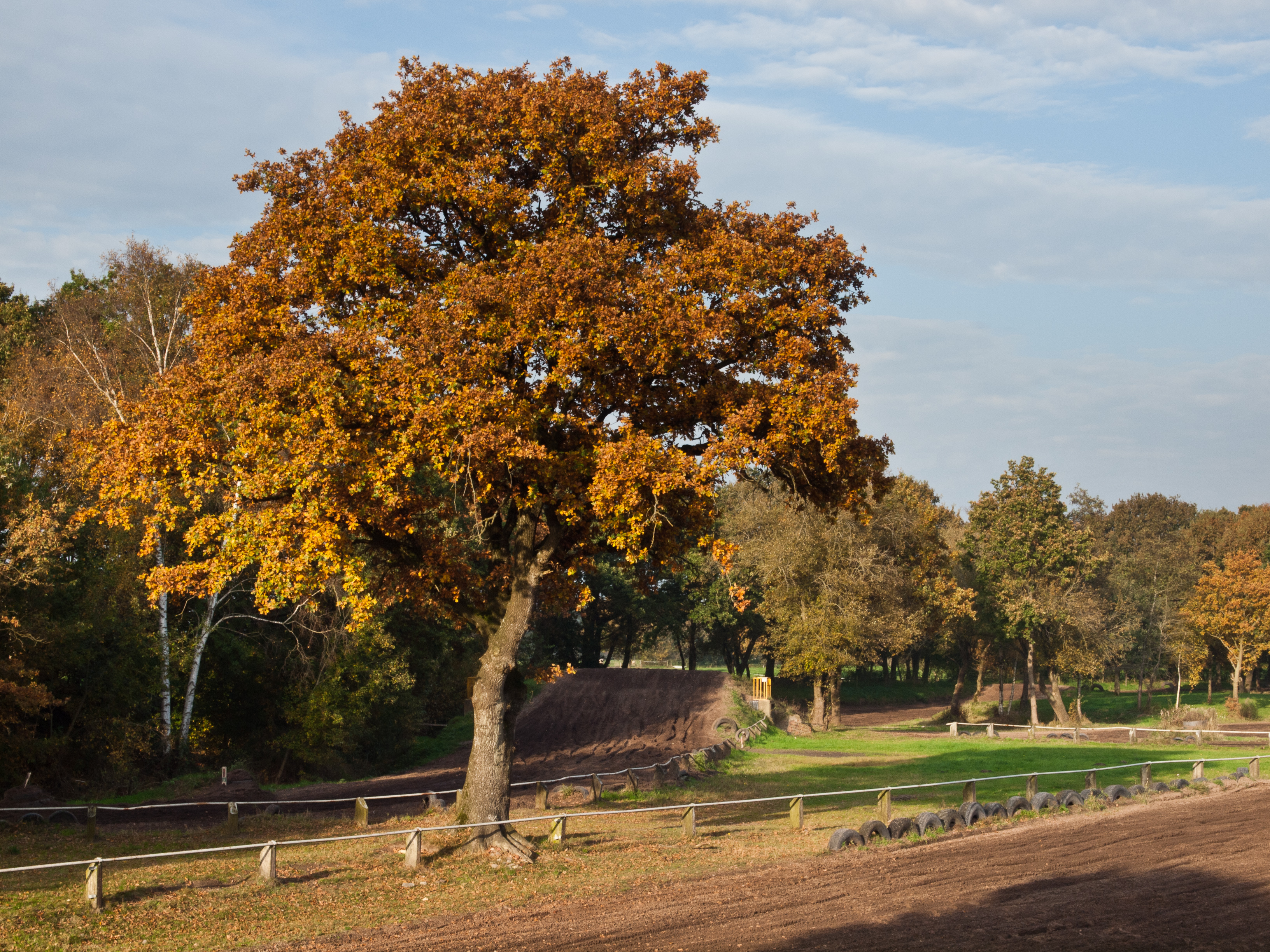 Herfst kleuren op het motorcross circuit van Trimunt